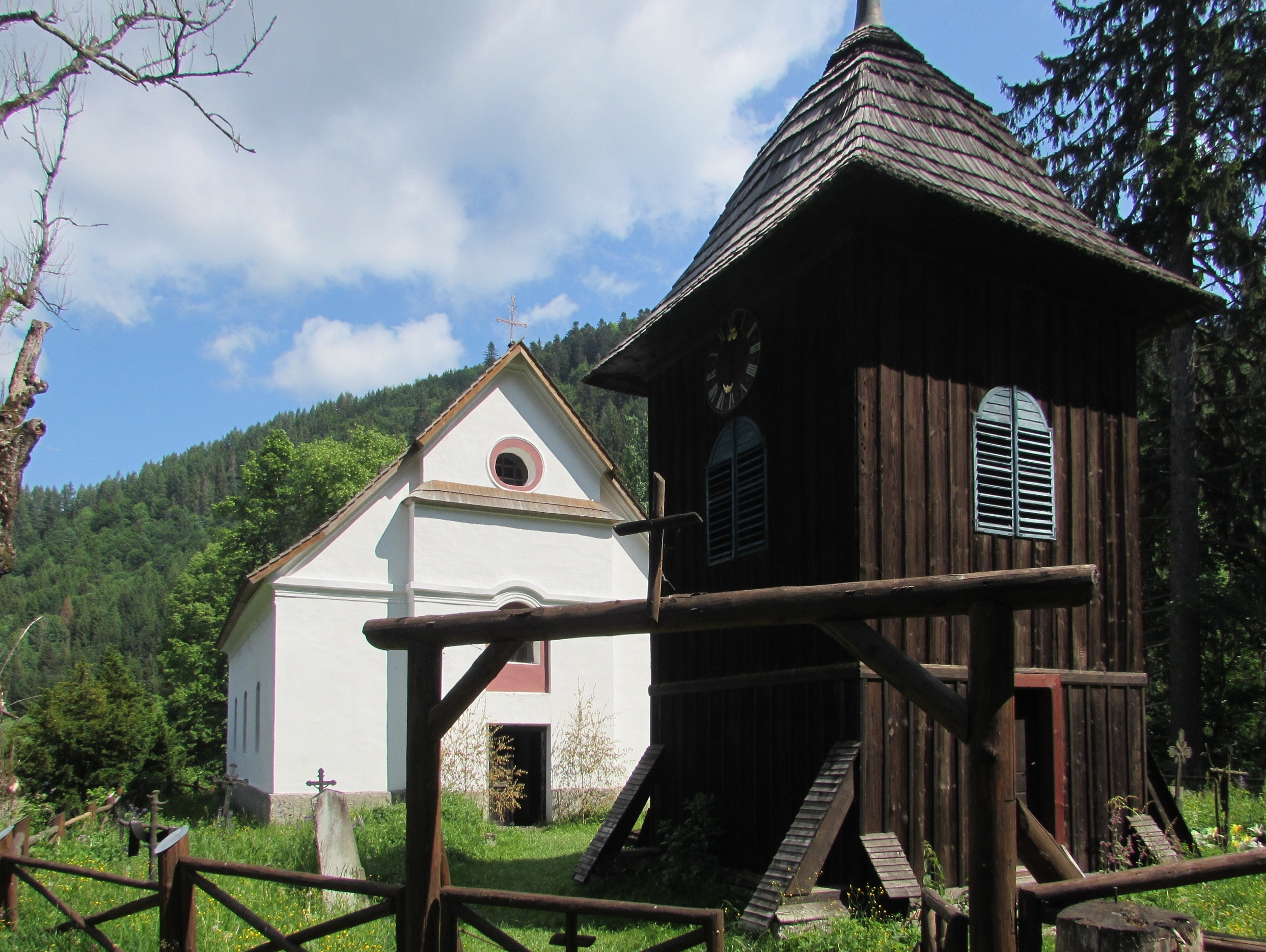 Najsvätejšej Trojice, Heilige Dreifaltigkeit in Čierny Váh